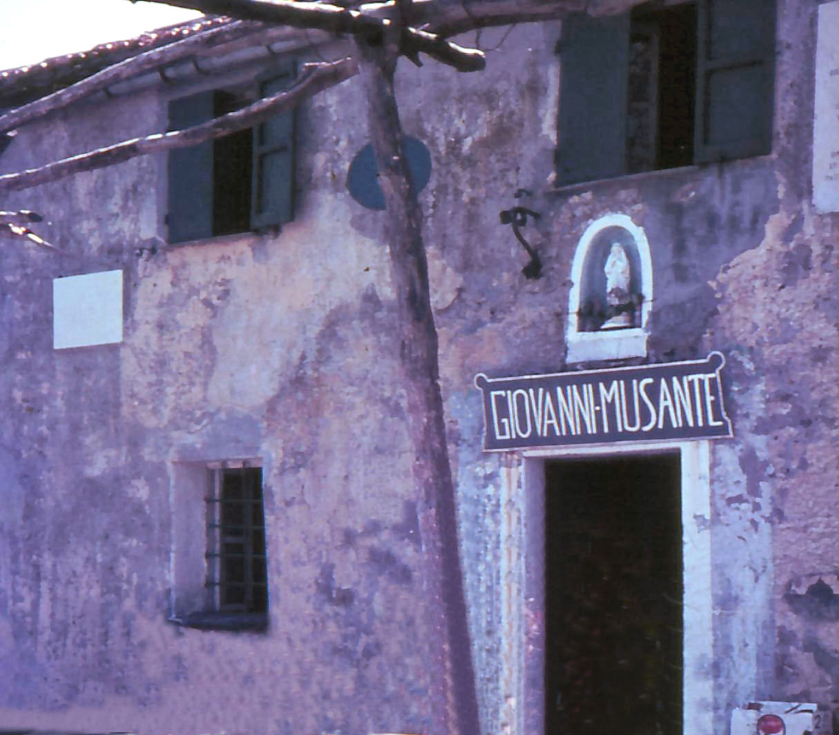 Monte Antola (città metropolitana di Genova), lo storico rifugio Giovanni Musante, ora distrutto, in un'immagine del 1974